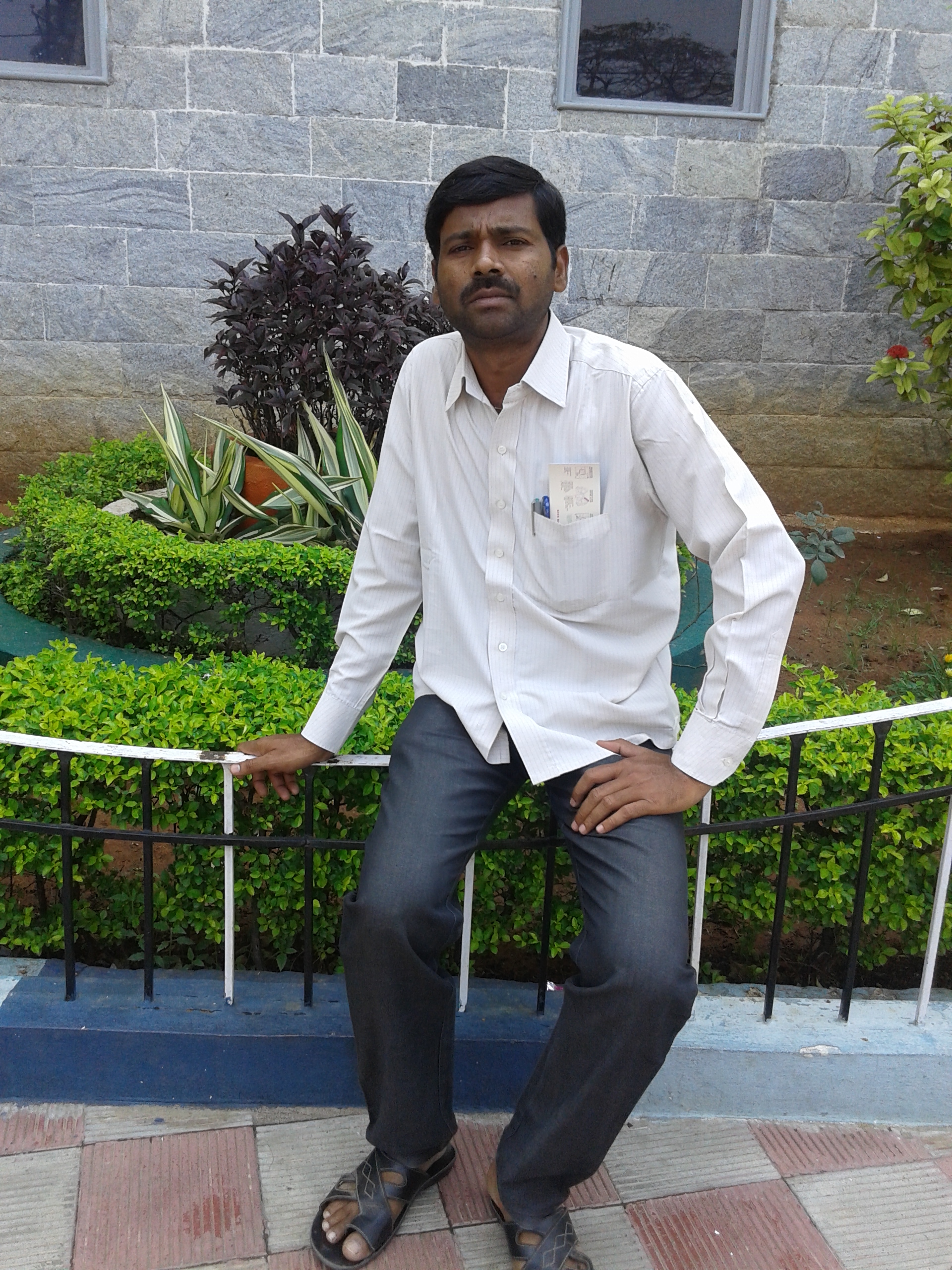 బూర్ల వేంకటేశ్వర్లు